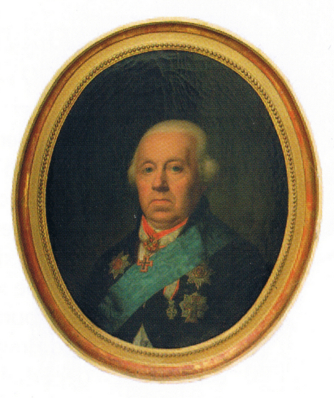 Josias von Qualen, Herr auf Damp und Verbitter von Itzehoe, Geheimer Konferenzrat und Klosterprobst von Uetersen. Träger des Elefantenorden, des Dannebrogorden und des St. Annen-Orden .